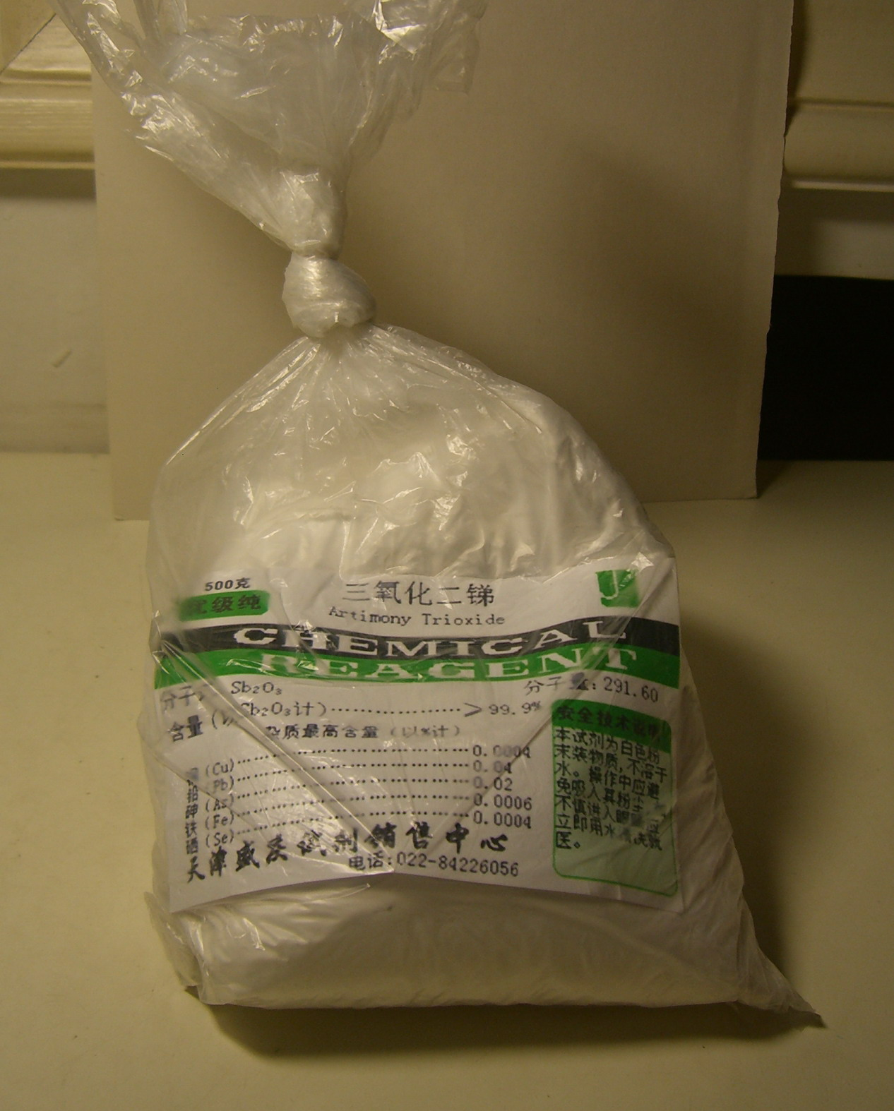 Antimony trioxide